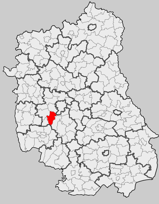 Map of gmina Niedrzwica Duża, Lublin county, Lublin voivodship Mapa gminy Niedrzwica Duża, powiat lubelski, województwo lubelskie